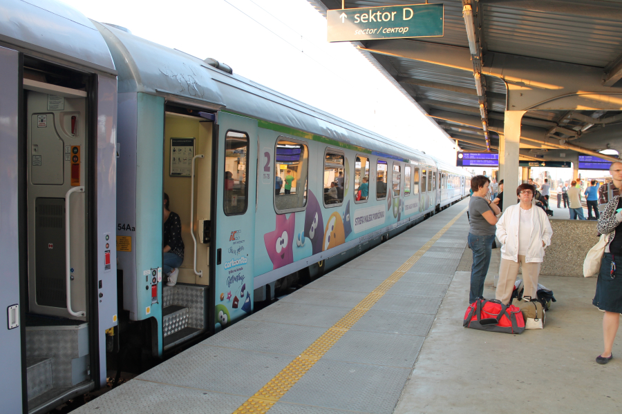 Wagon osobowy 154Aa Strefa Małego Podróżnika stoi na stacji Warszawa Wschodnia.